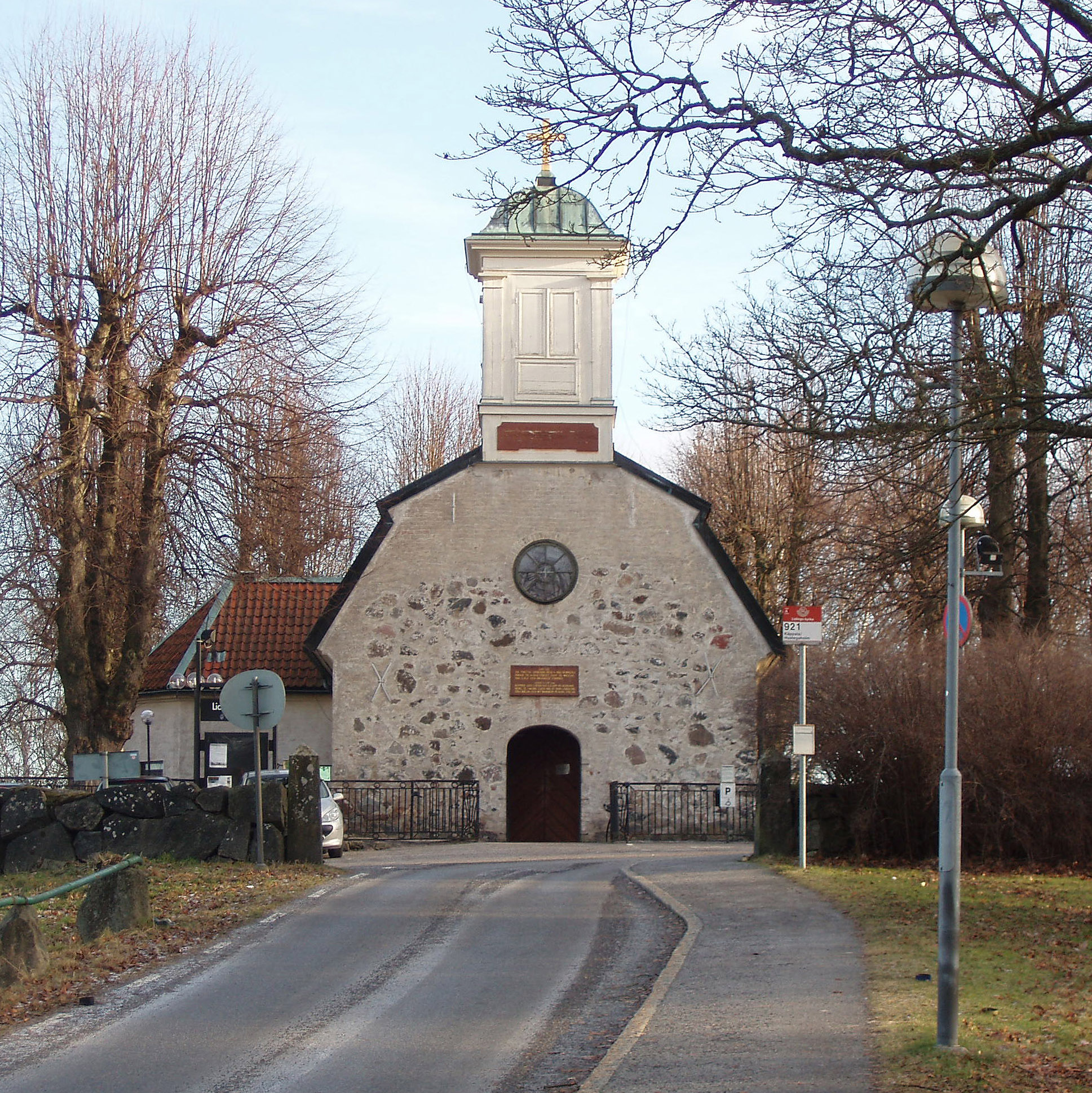 Lidingö gamla kyrka, från 1623. Lidingö old church, from 1623.